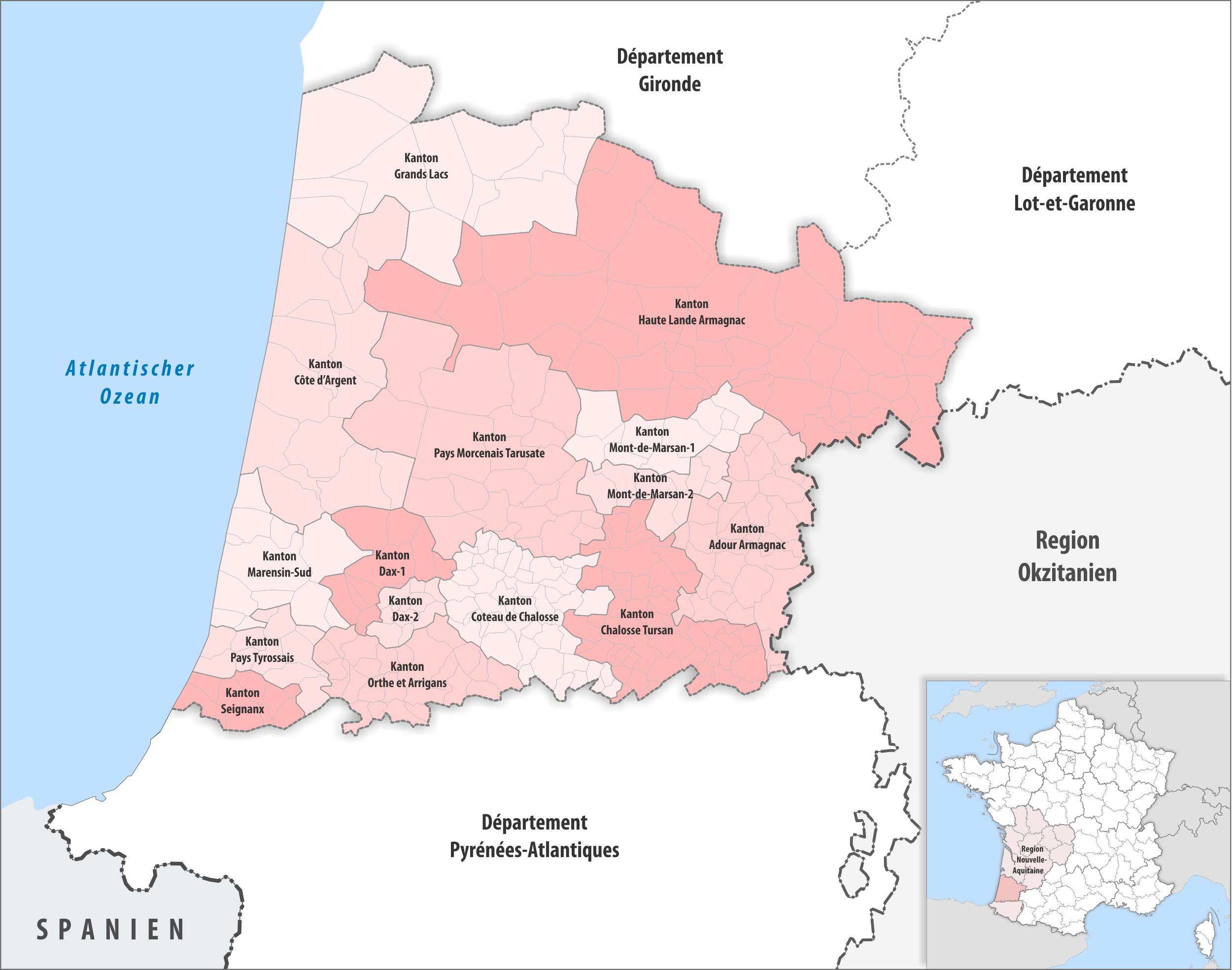 Gemeinden und Kantone im Departement Landes